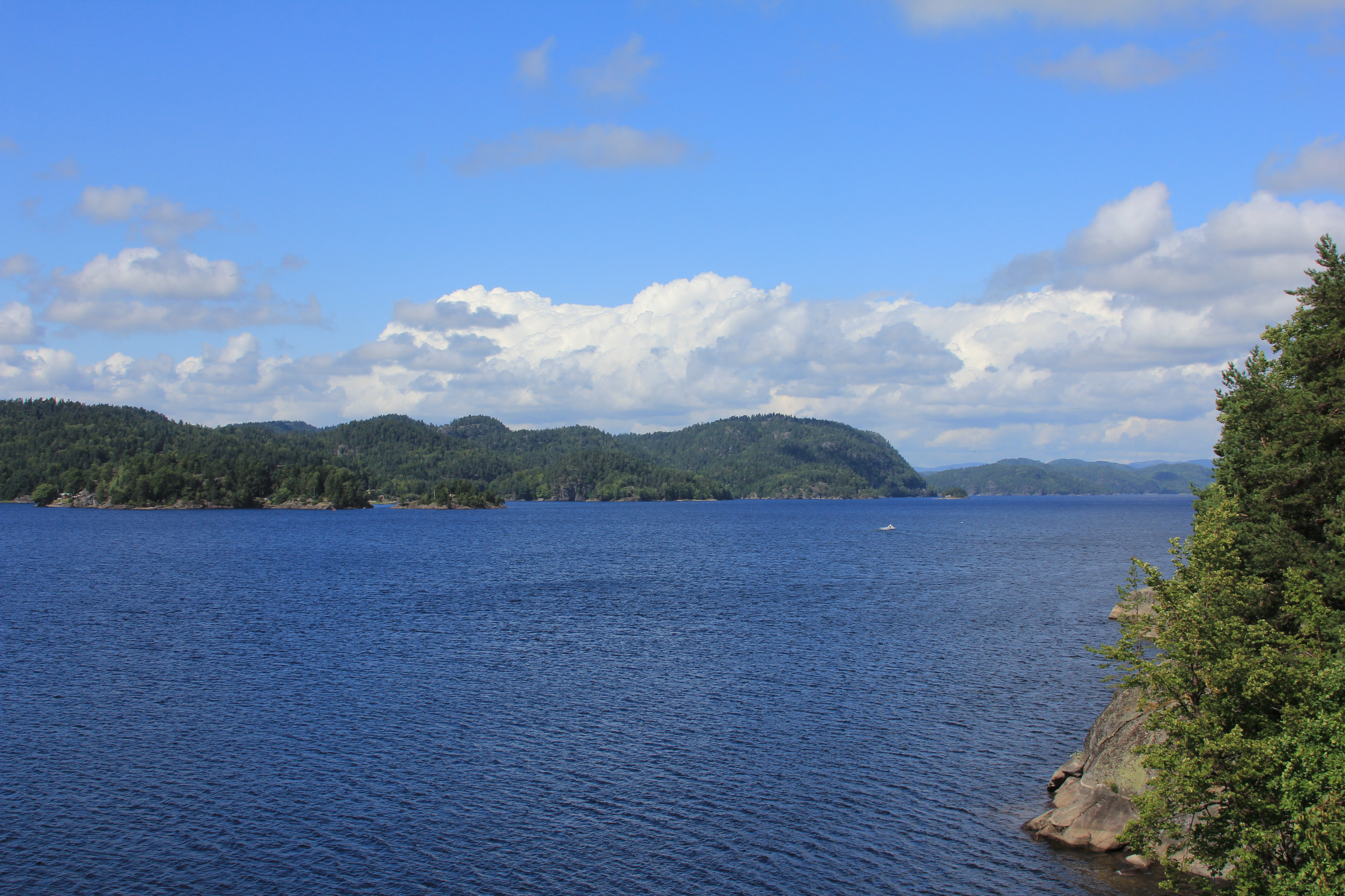 Farrisvannet fra sofaen